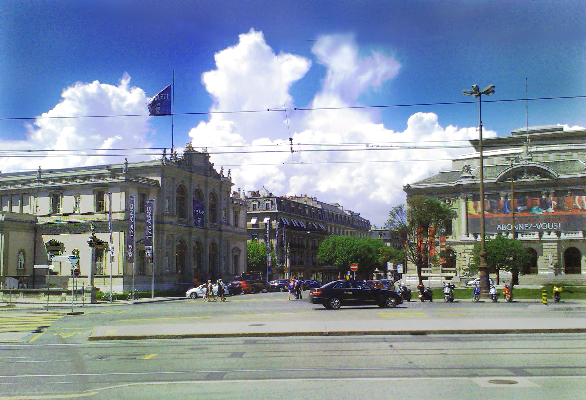 Conservatoire de Musique de Genève (gauche) et le Grand Théâtre (droite) sur Place Neuve, Genève, Suisse